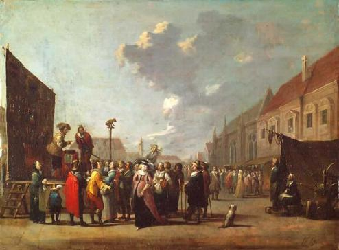 Prag um 1750